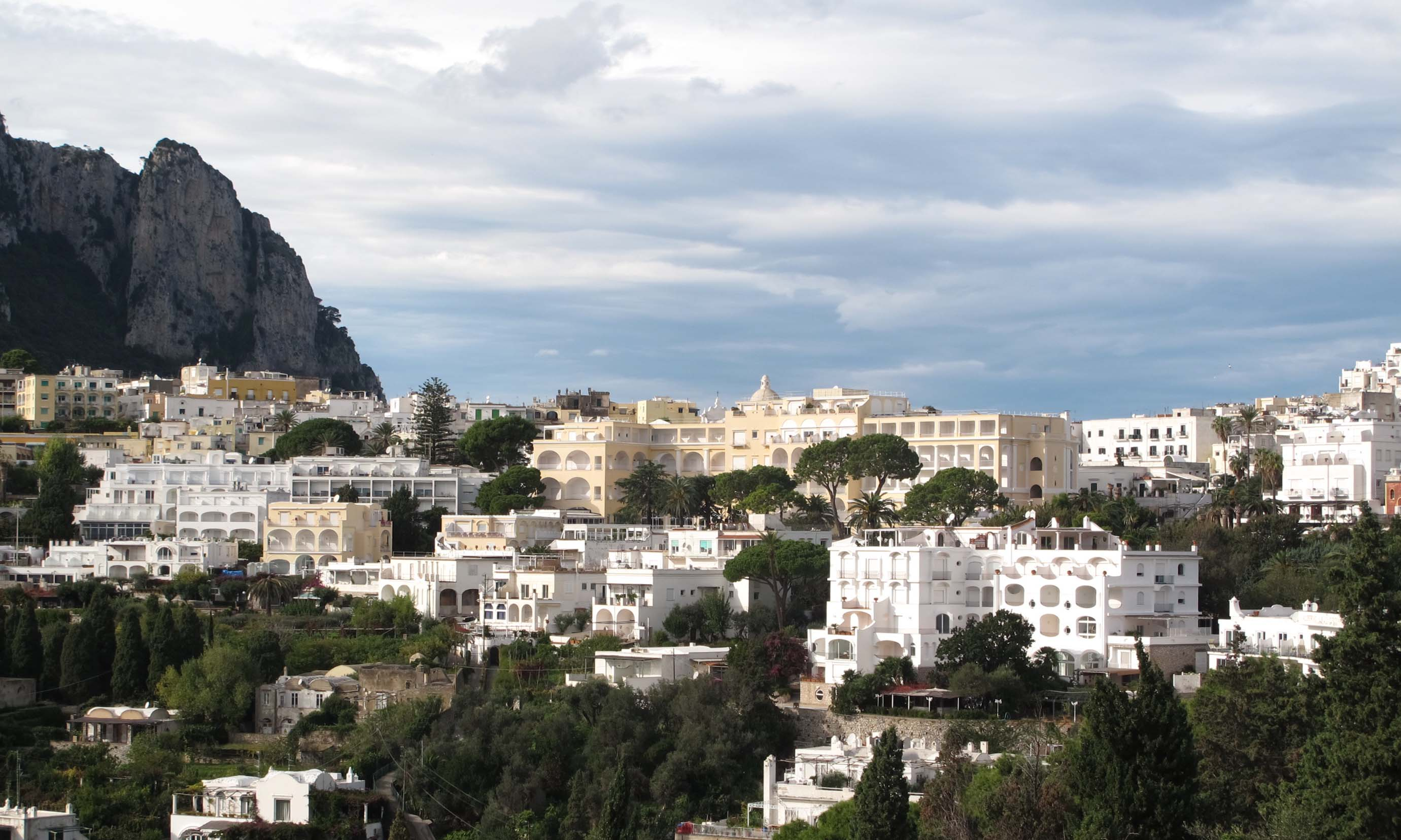 Ville de Capri, Capri, Italie